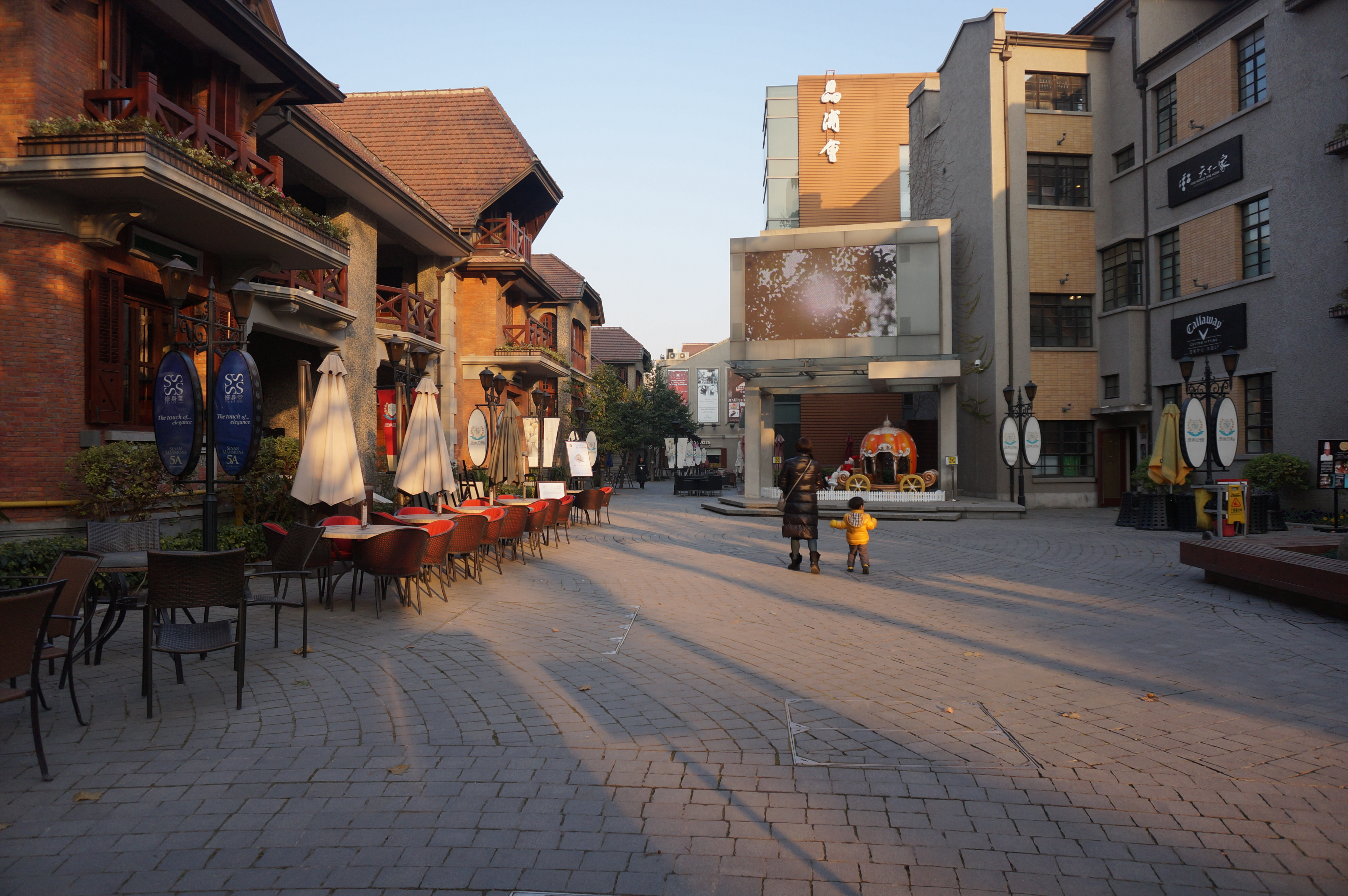 上海思南公馆